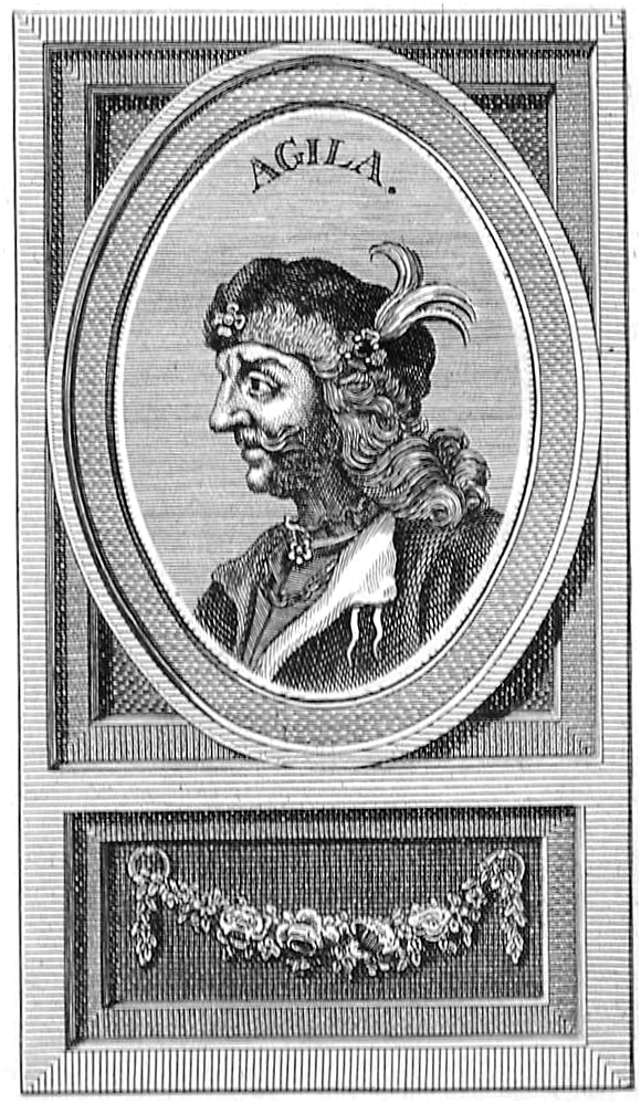 Reyes visigodos de Hispania. Retrato de Agila